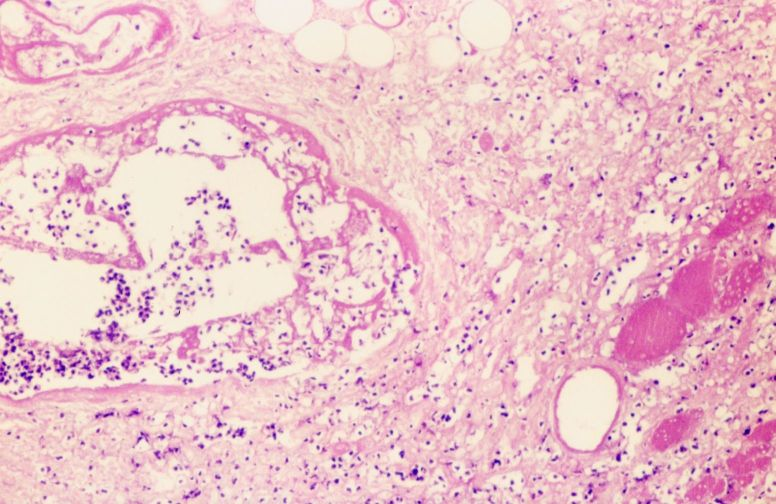 Prostatitis crònica. Microscopi òptic. 150X. Tinció H&E